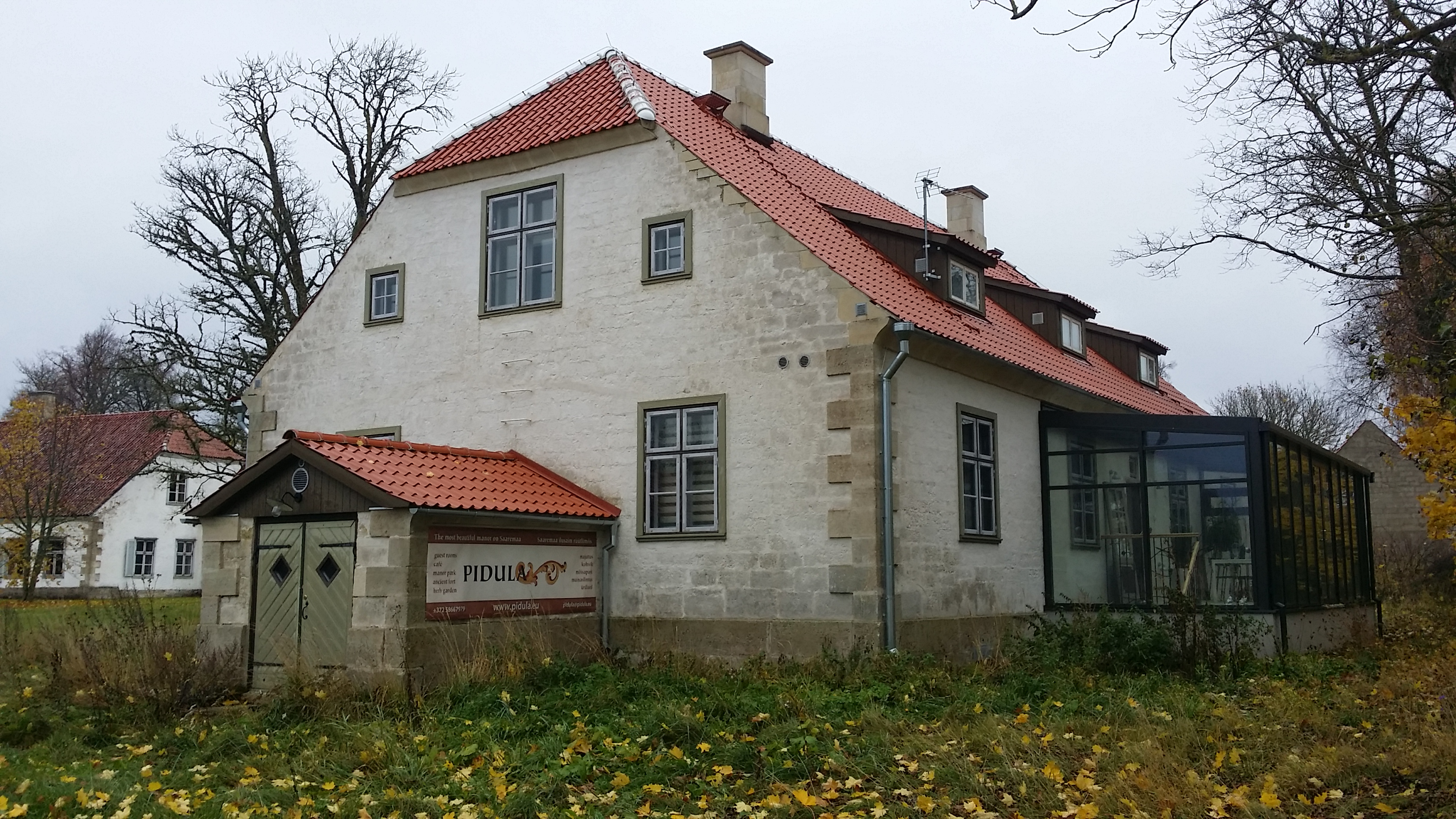 Pidula mõisa valitsejamaja tagakülg